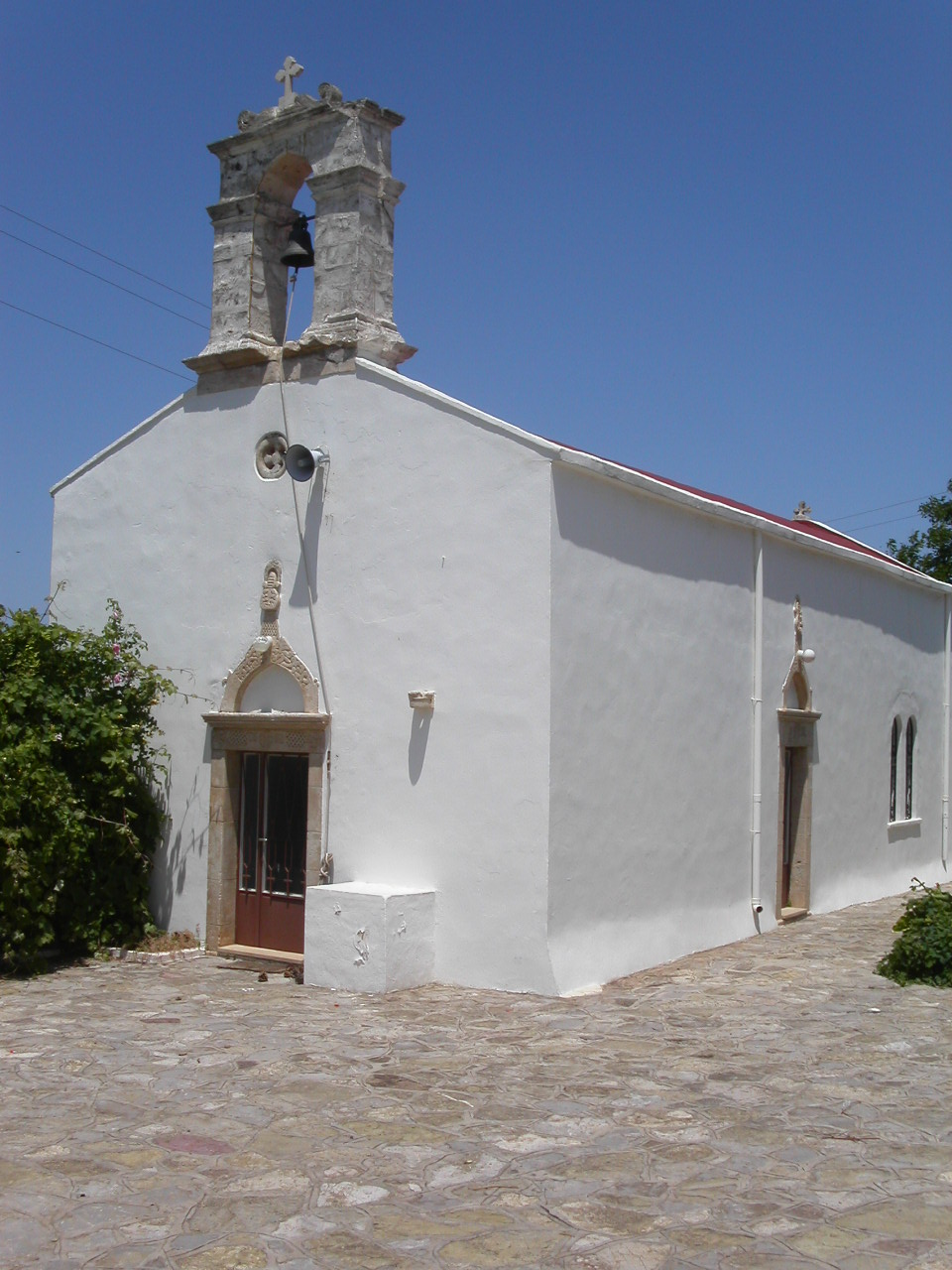 Smarichurch